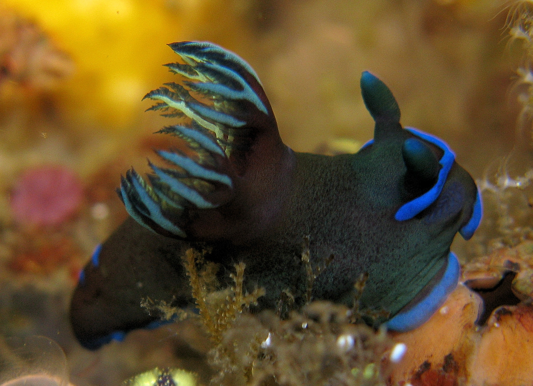 Tambja morosa, Bitung, Célebes Septentrional, Indonesia